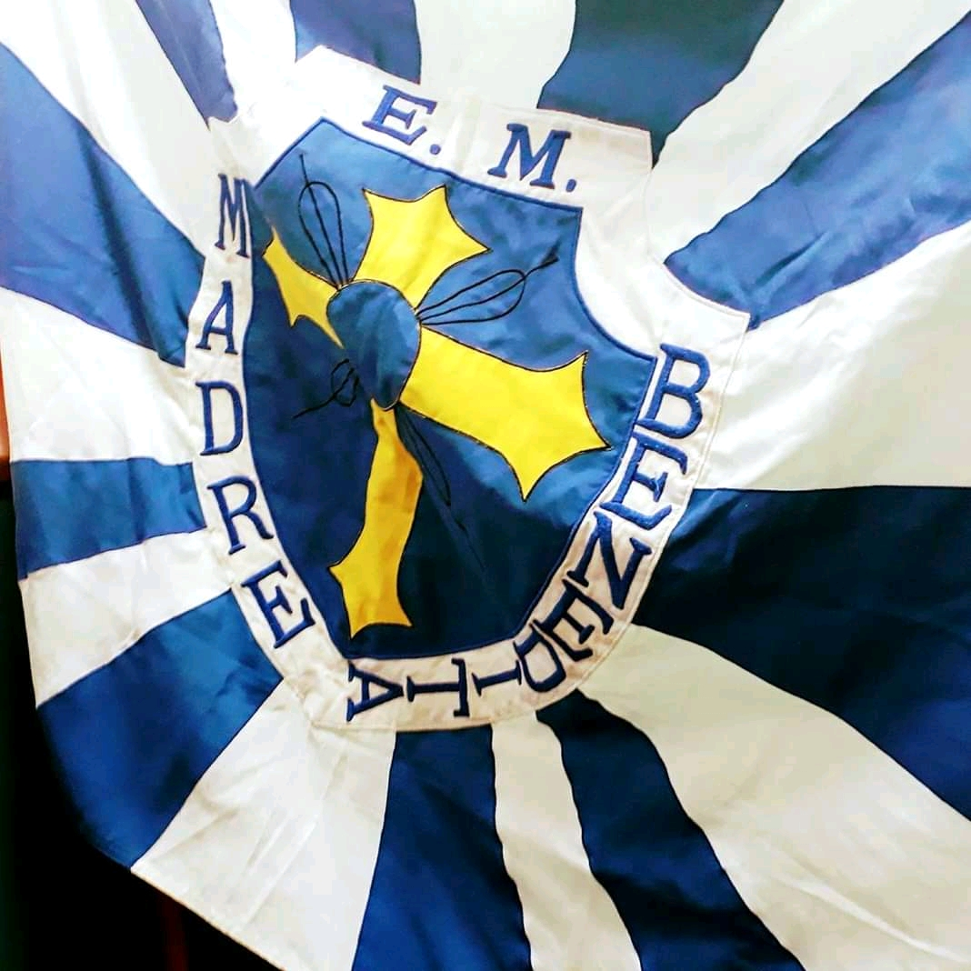 Bandeira da Escola Municipal Madre Benedita